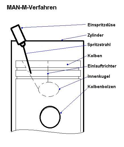 MAN-M-Verfahren.